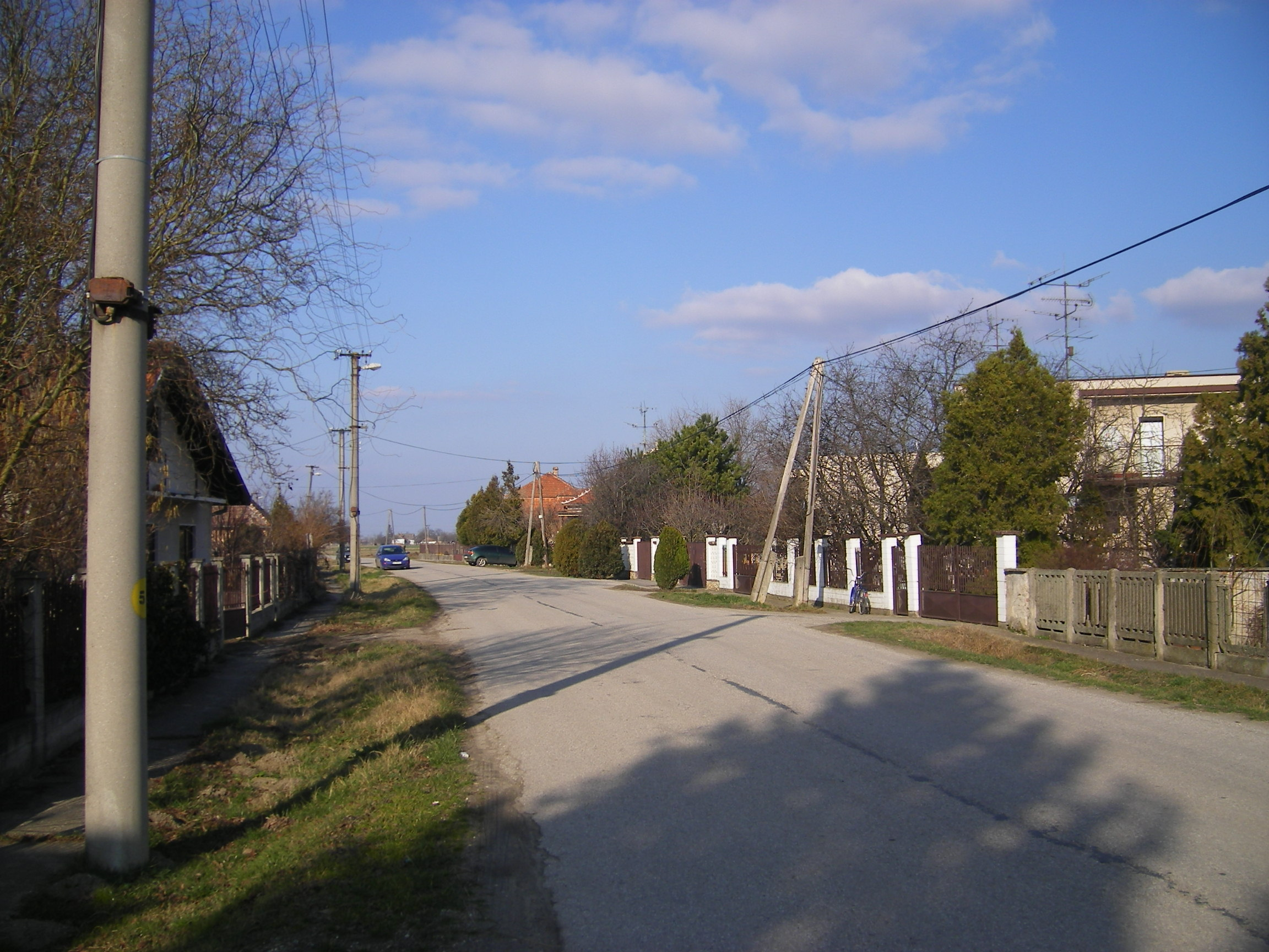 Vágfüzes - Sziget főutcája.